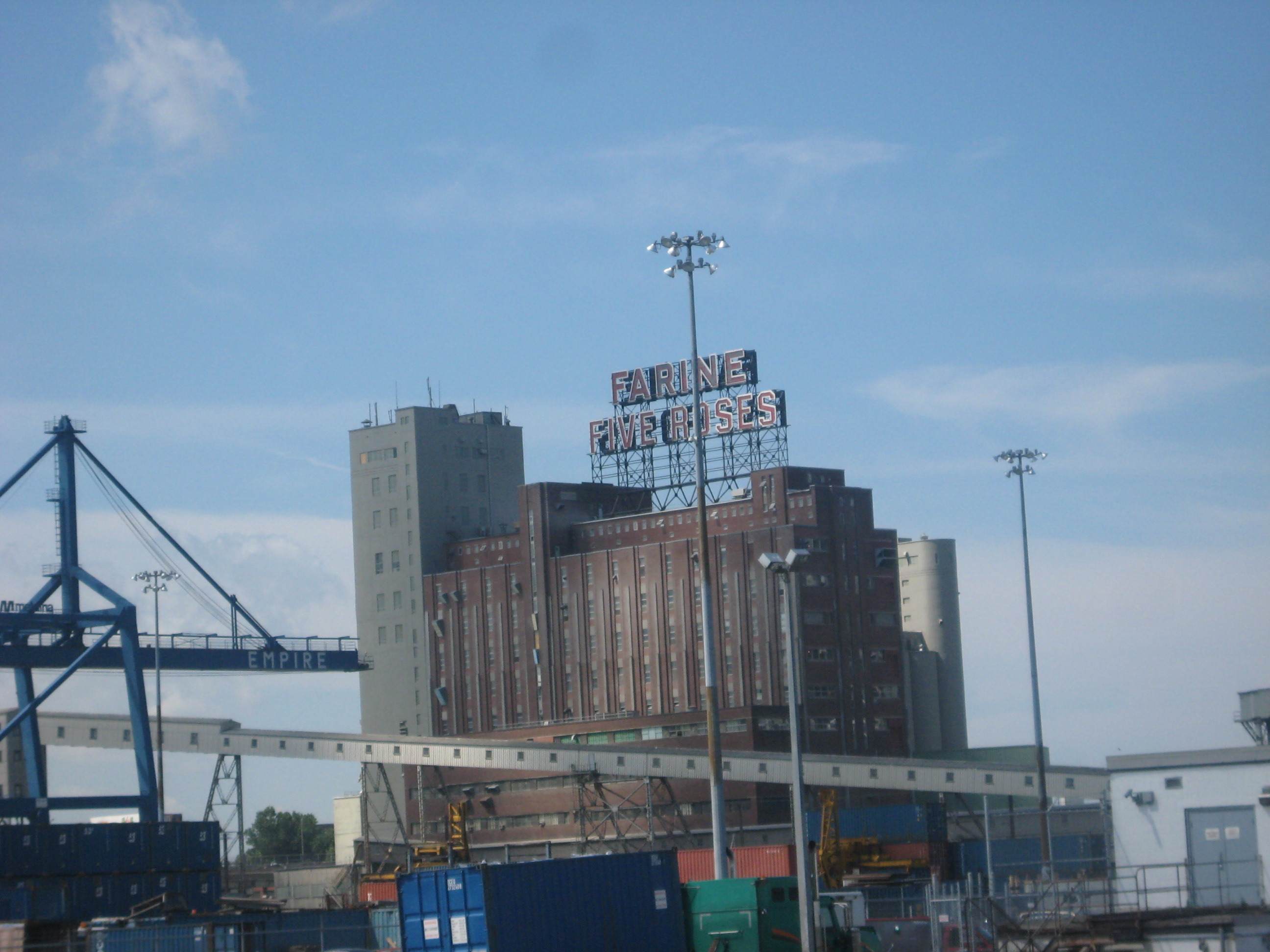 Minoterie Farine Five Roses et Quai Bikerdike vu du Quai Pierre Dupuy